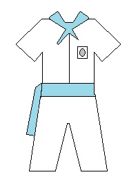 Divisa disegnata su modello di quelle realmente indossate dagli Mbuttaturi della Madonna della Lettera di Palmi